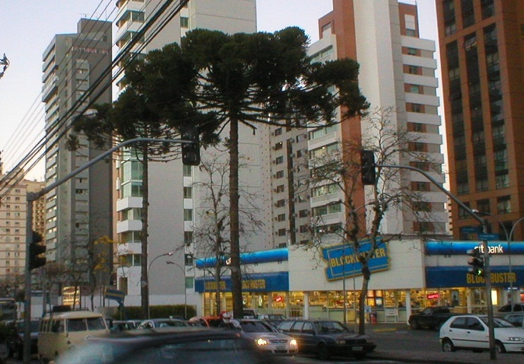 Locadora Blockbuster em Curitiba